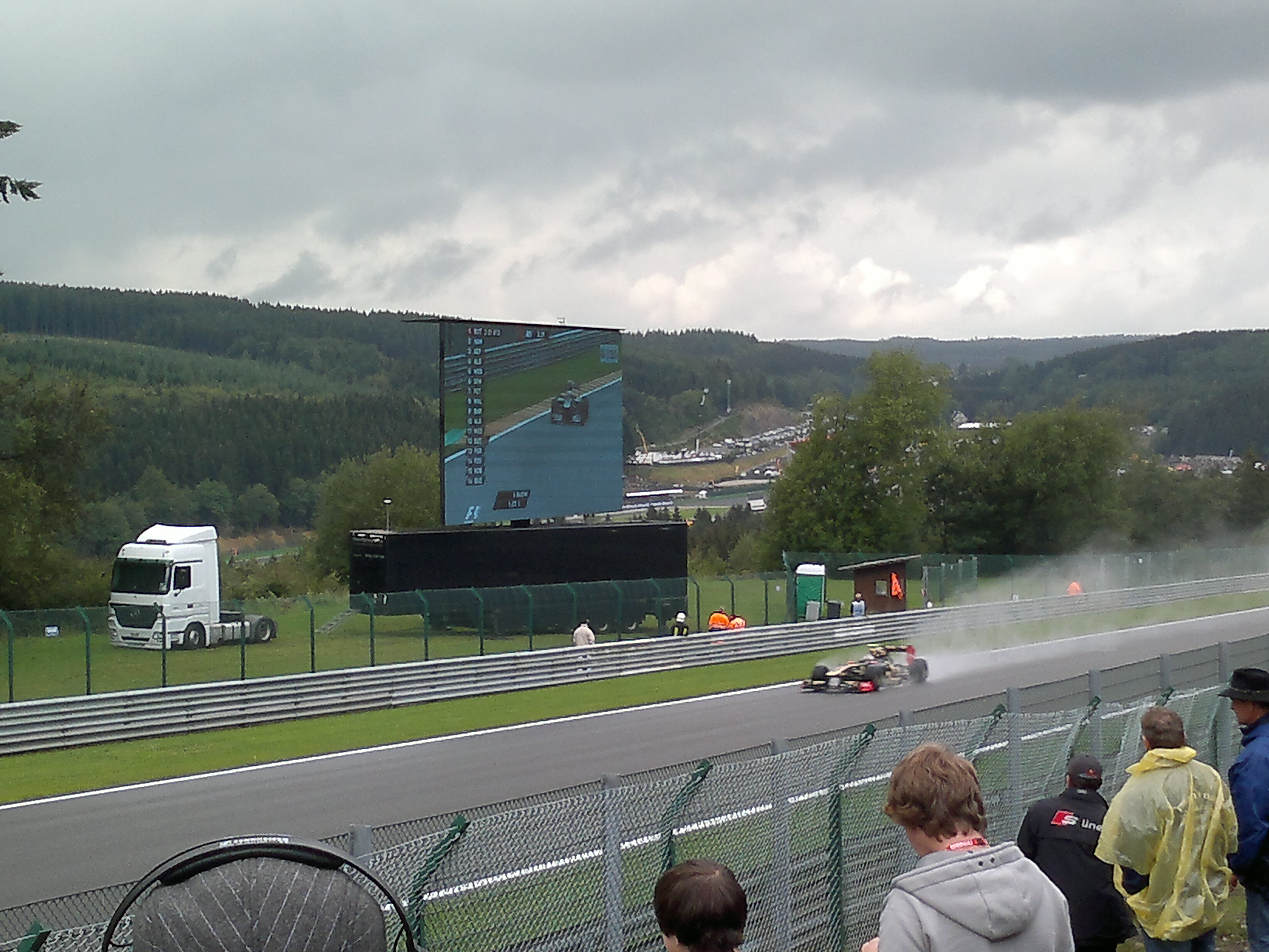 Grand Prix de Belgique Spa Francorchamps